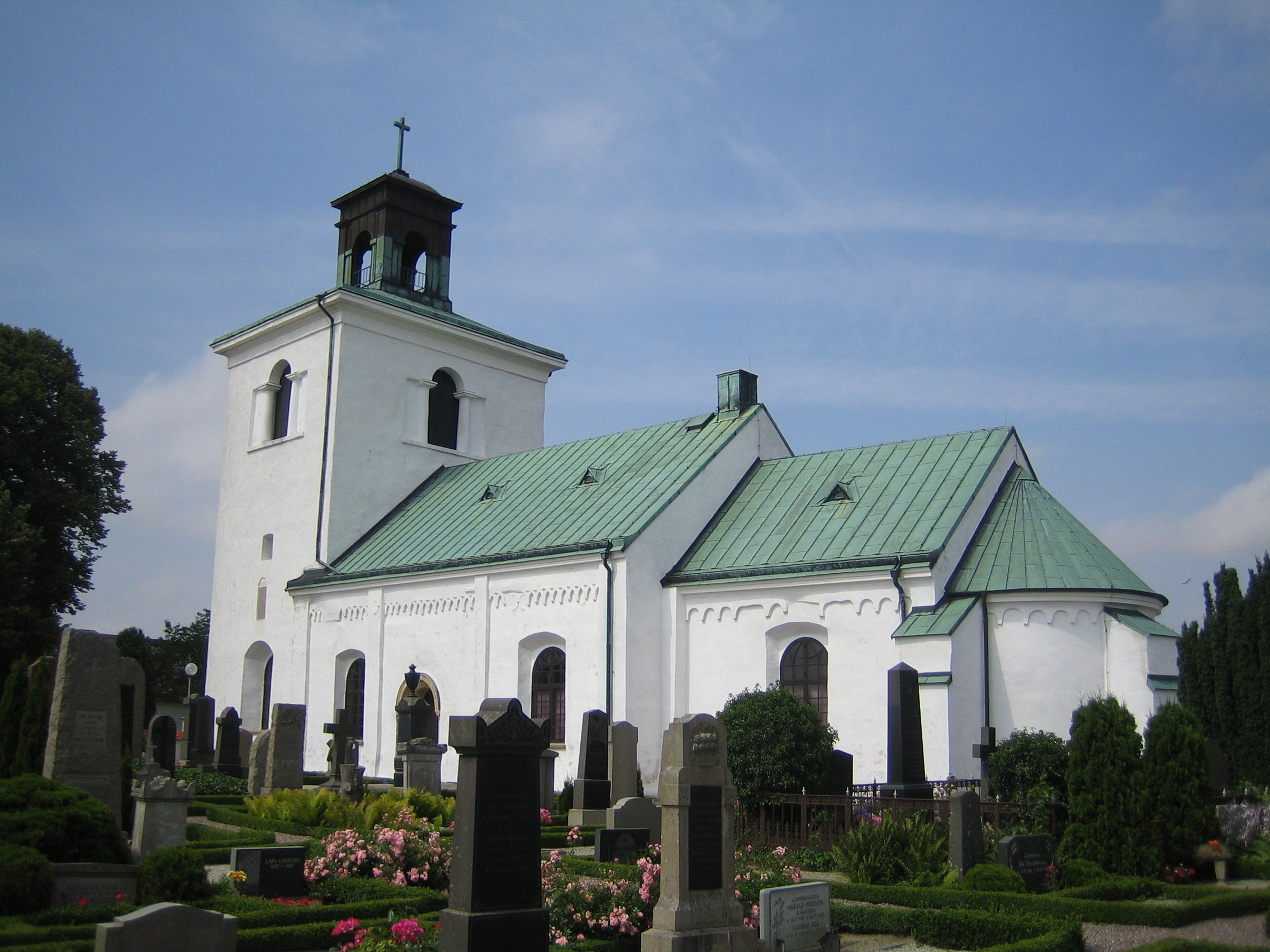 Gislövs kyrka.